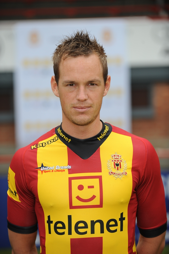 Deens middenvelder